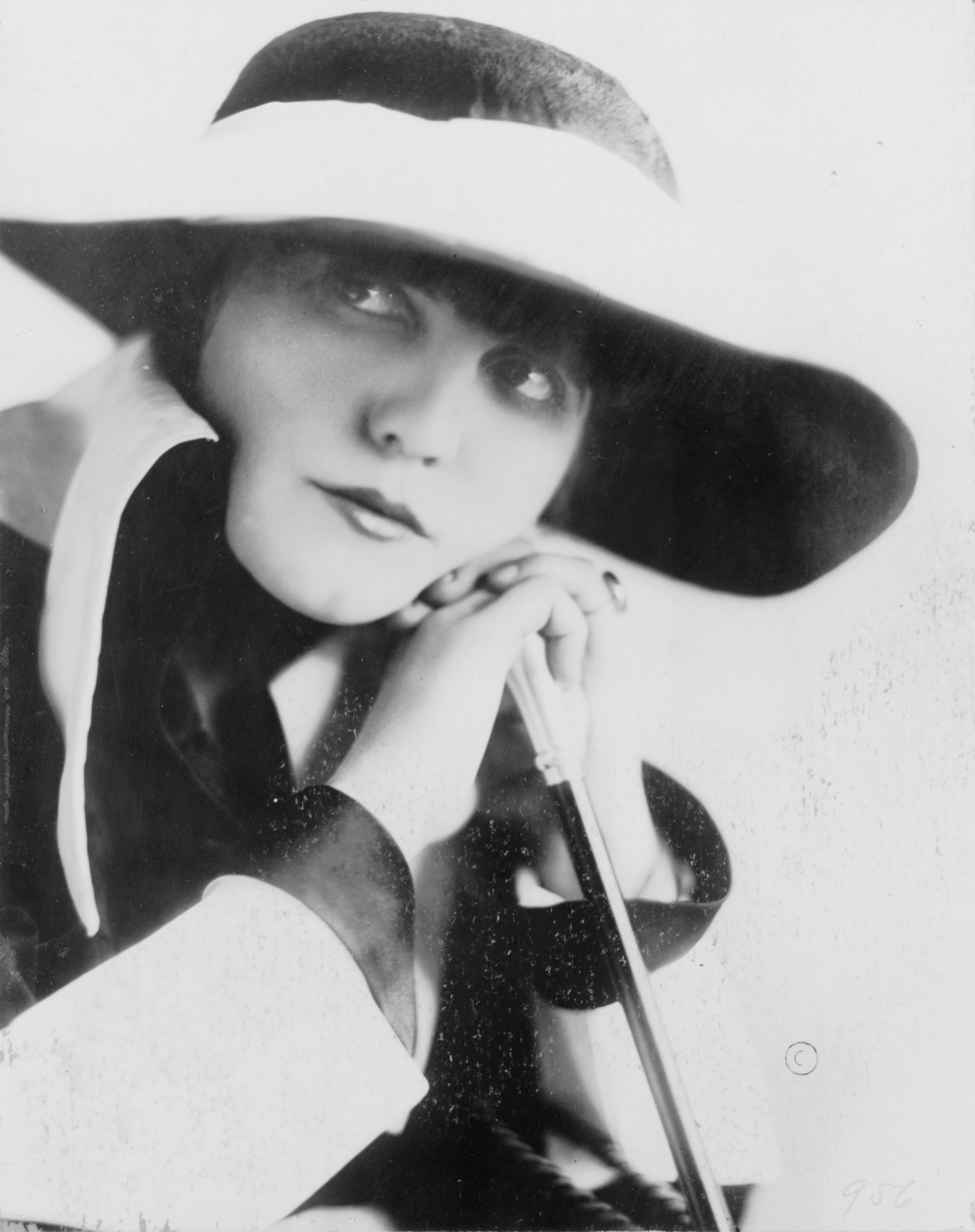 Actor Louise Glaum